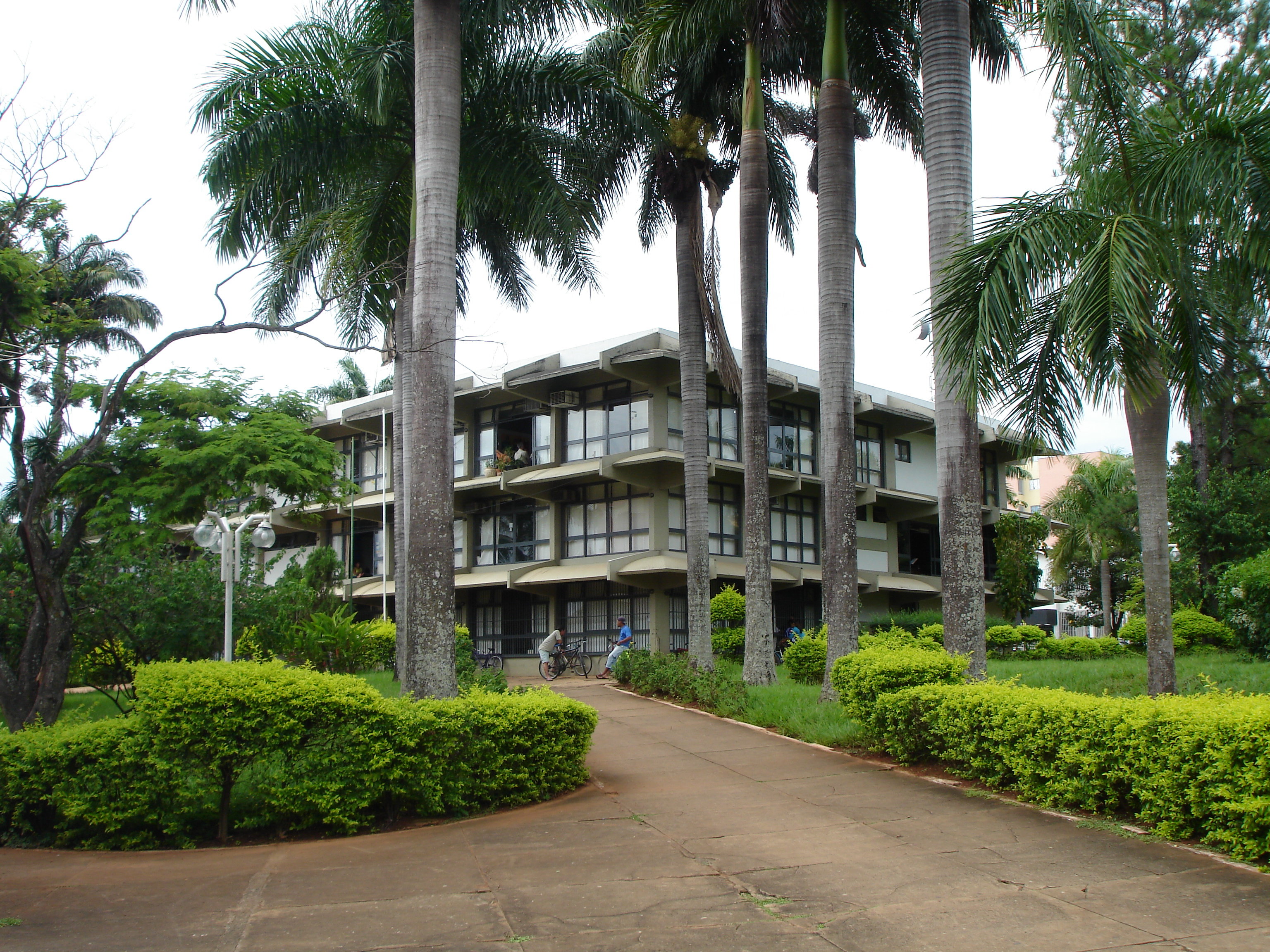 Foto do prédio da prefeitura de Unaí